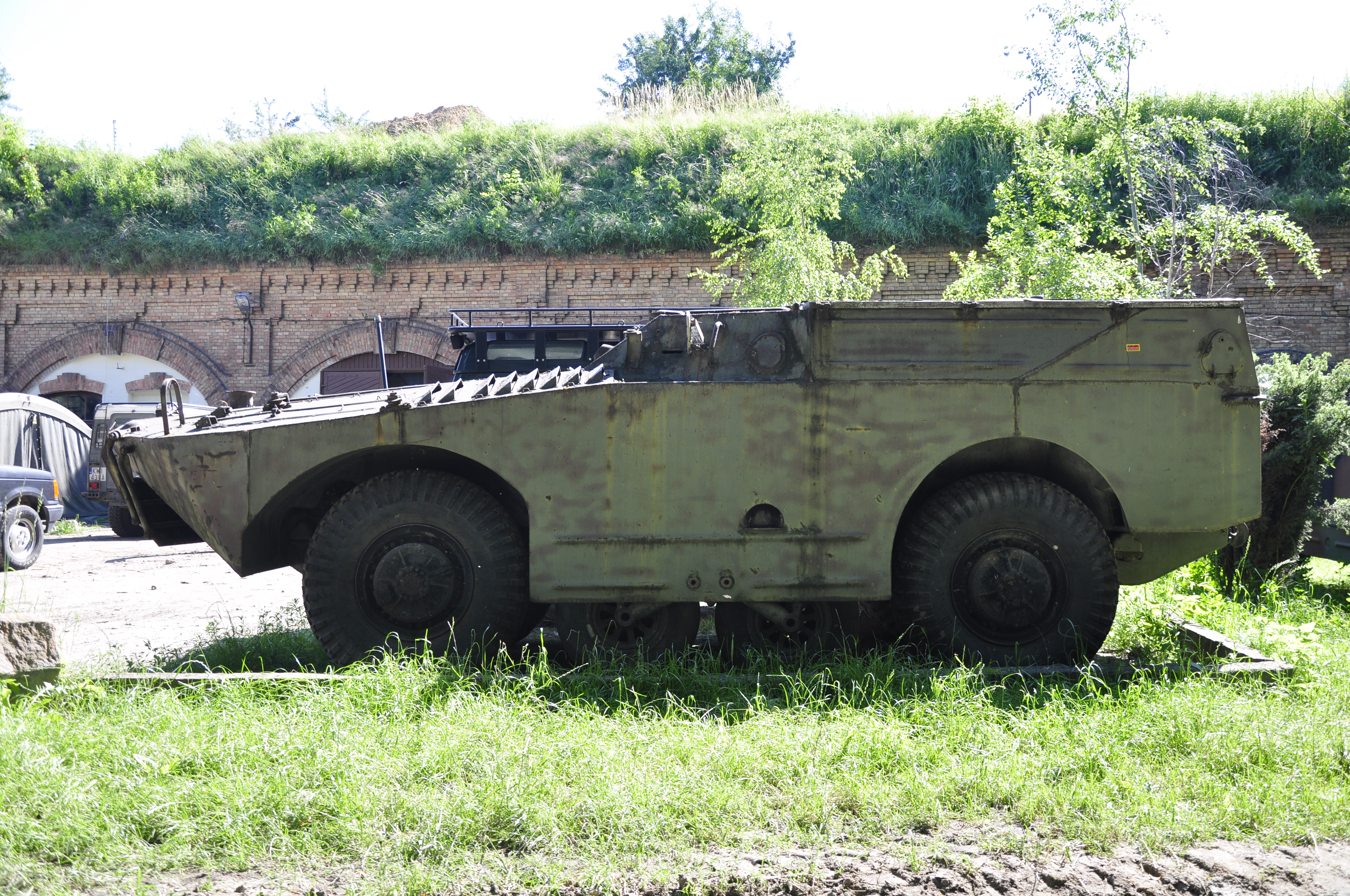 Fort V Warschau, Militaria-Verein, Panzerwagen